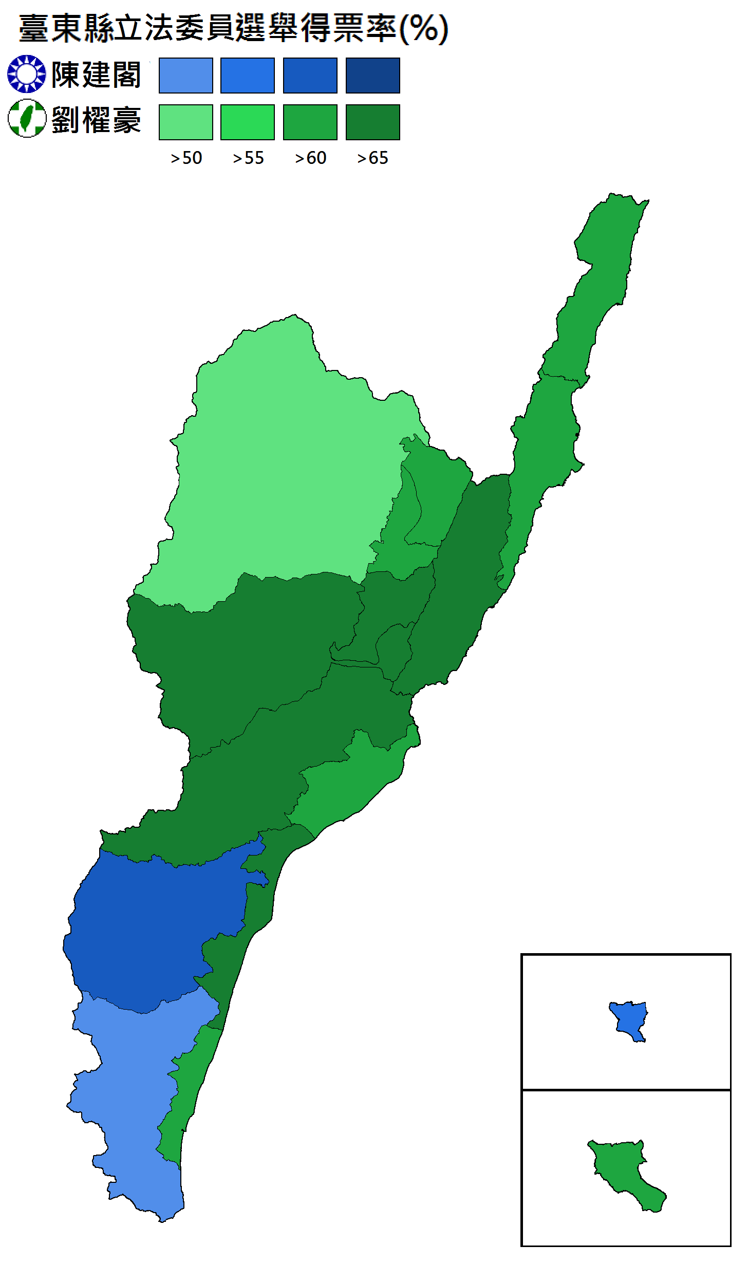 2016立委選舉